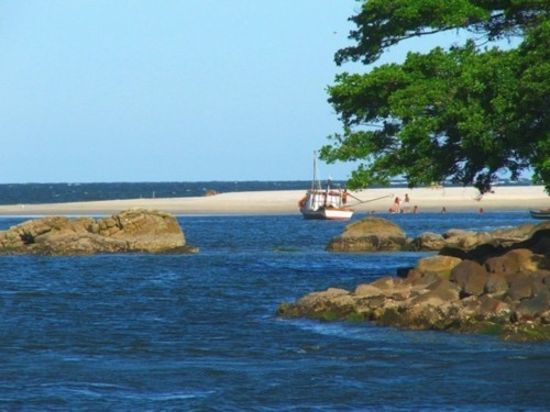 Praia de Caieiras em Guaratuba.